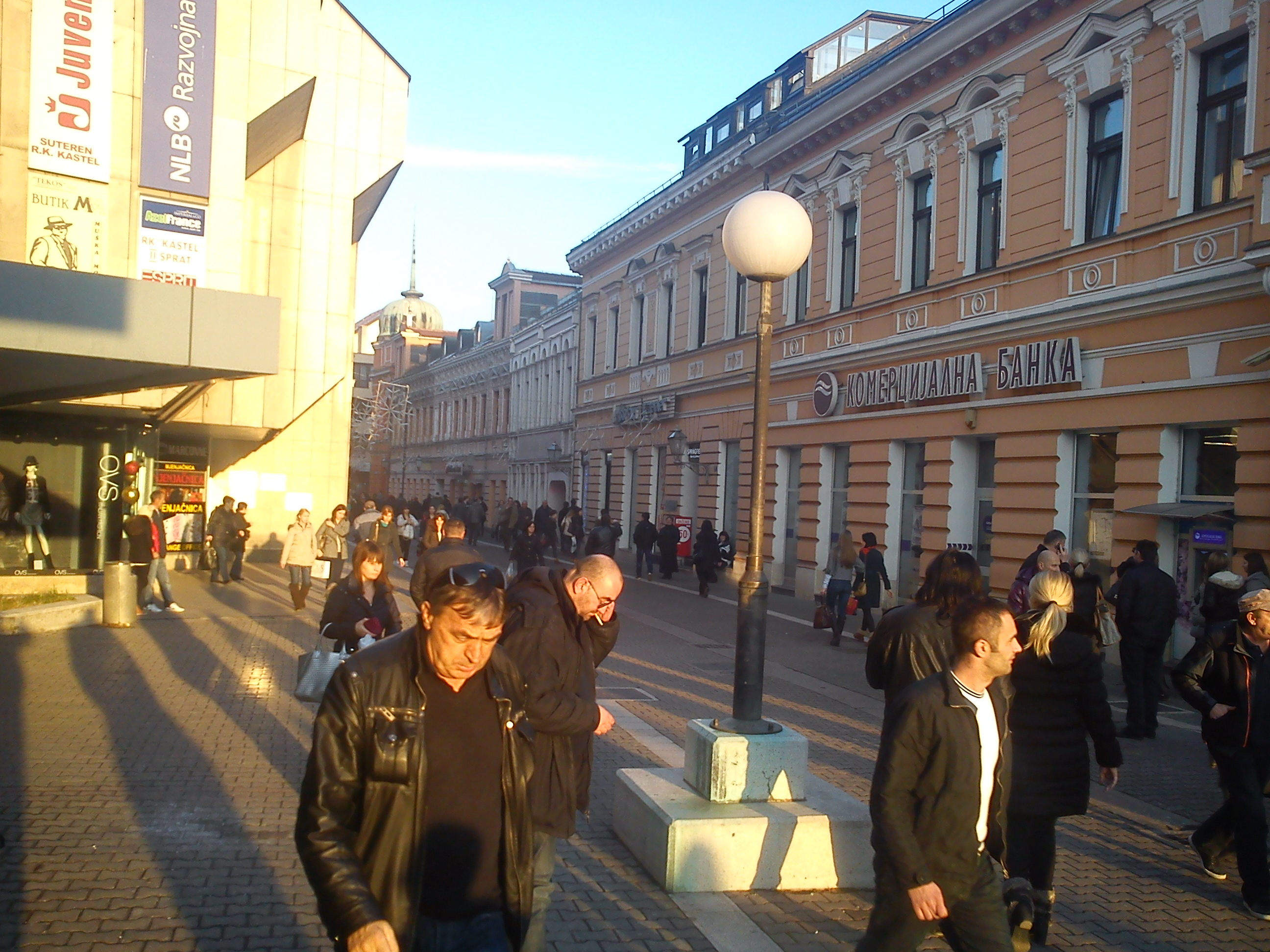 Ul Veselina Masleše (Gospodska ulica, BL)